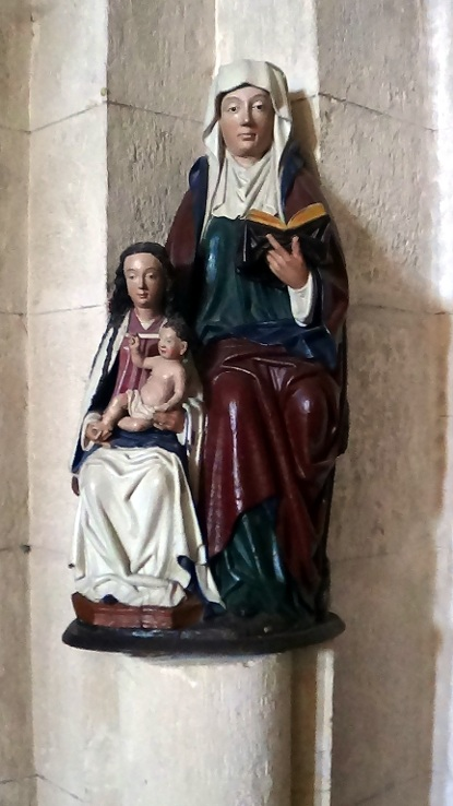 fait partie d'une chapelle classée aux Monuments Historiques